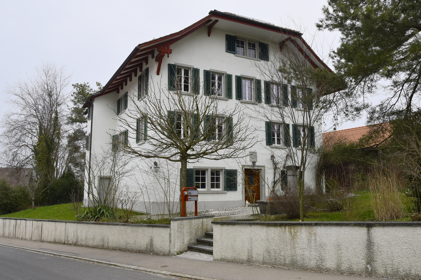 Reformiertes Pfarrhaus, ID 18200620